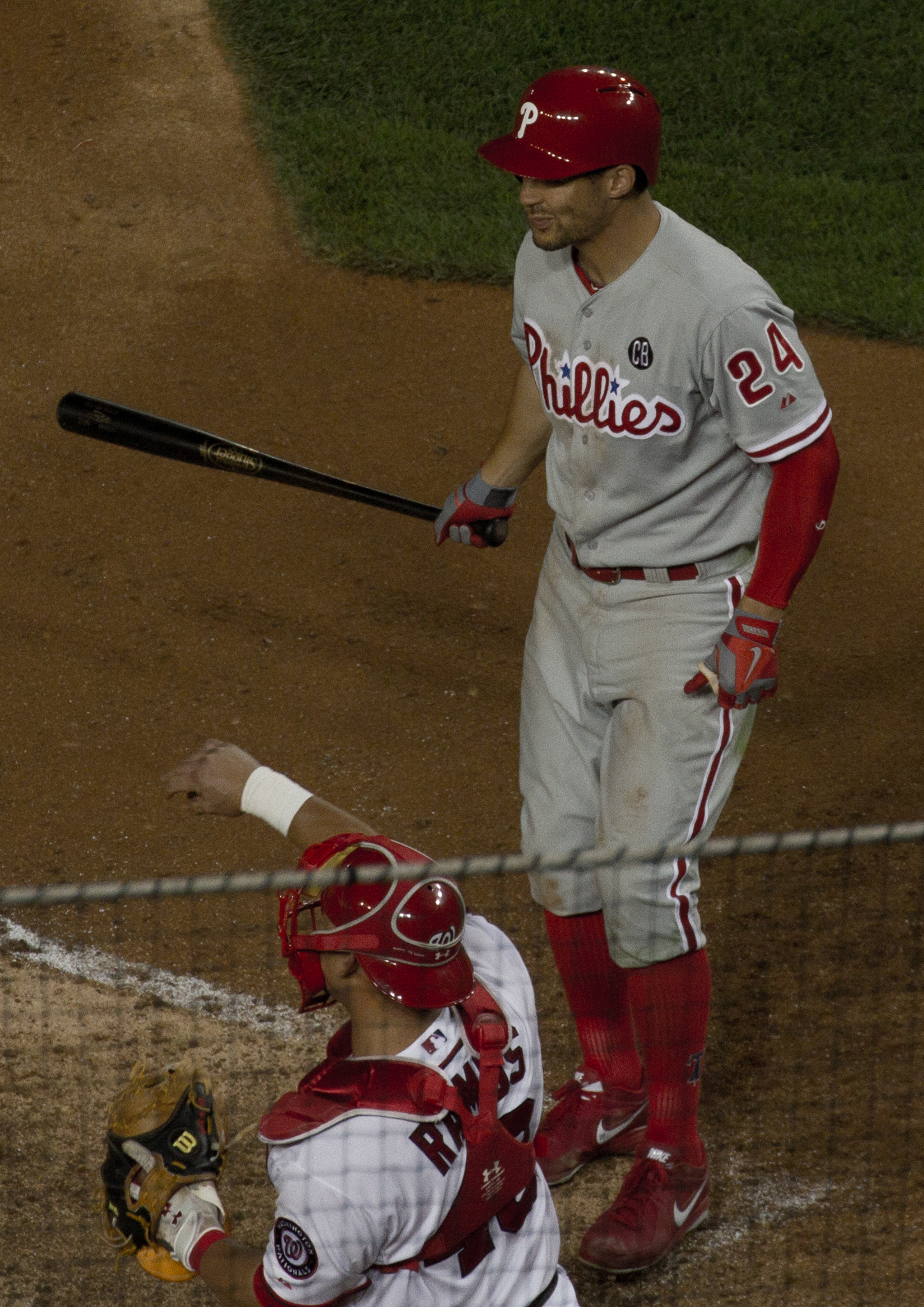 Grady Sizemore